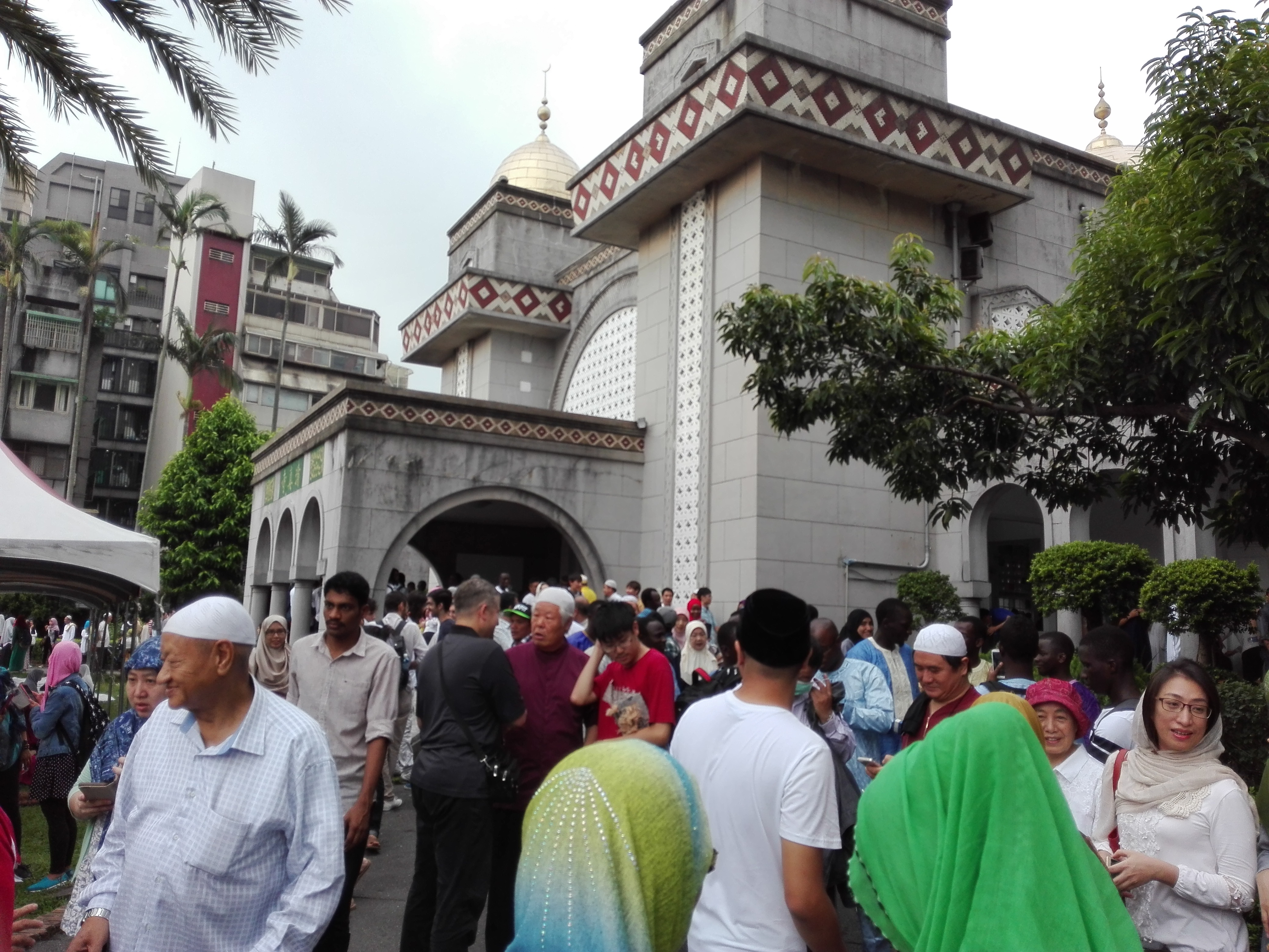 masjed- Taipei, Sep 2016